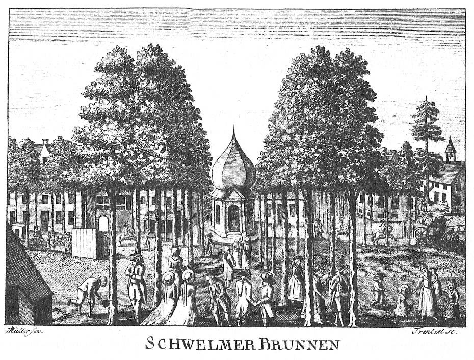 Ansicht des Schwelmer Gesundbrunnens (Kupferstich nach einer Zeichnung von F. C. Müller)